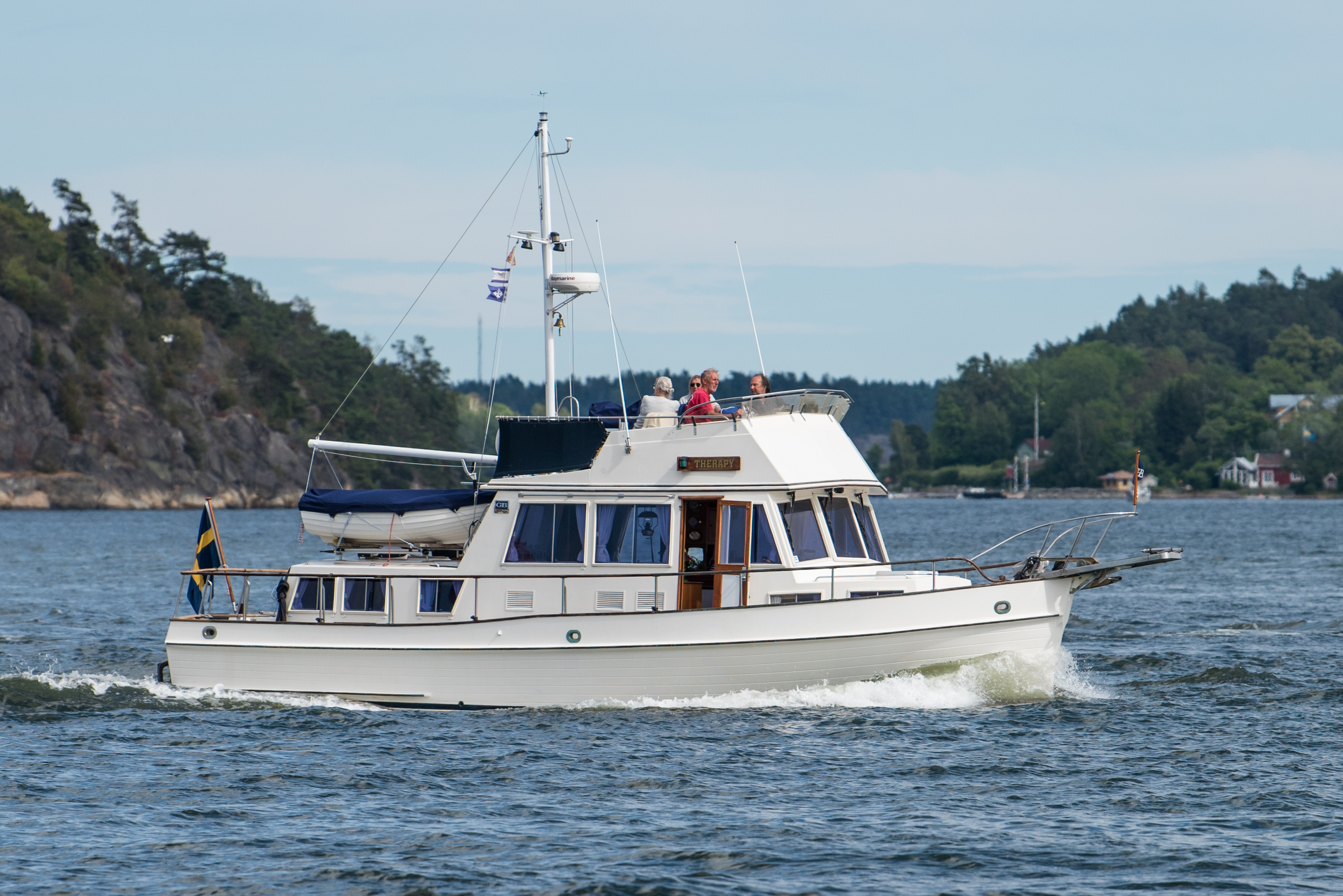 Ships, Vaxholm, Stockholm, Sweden, June 2018